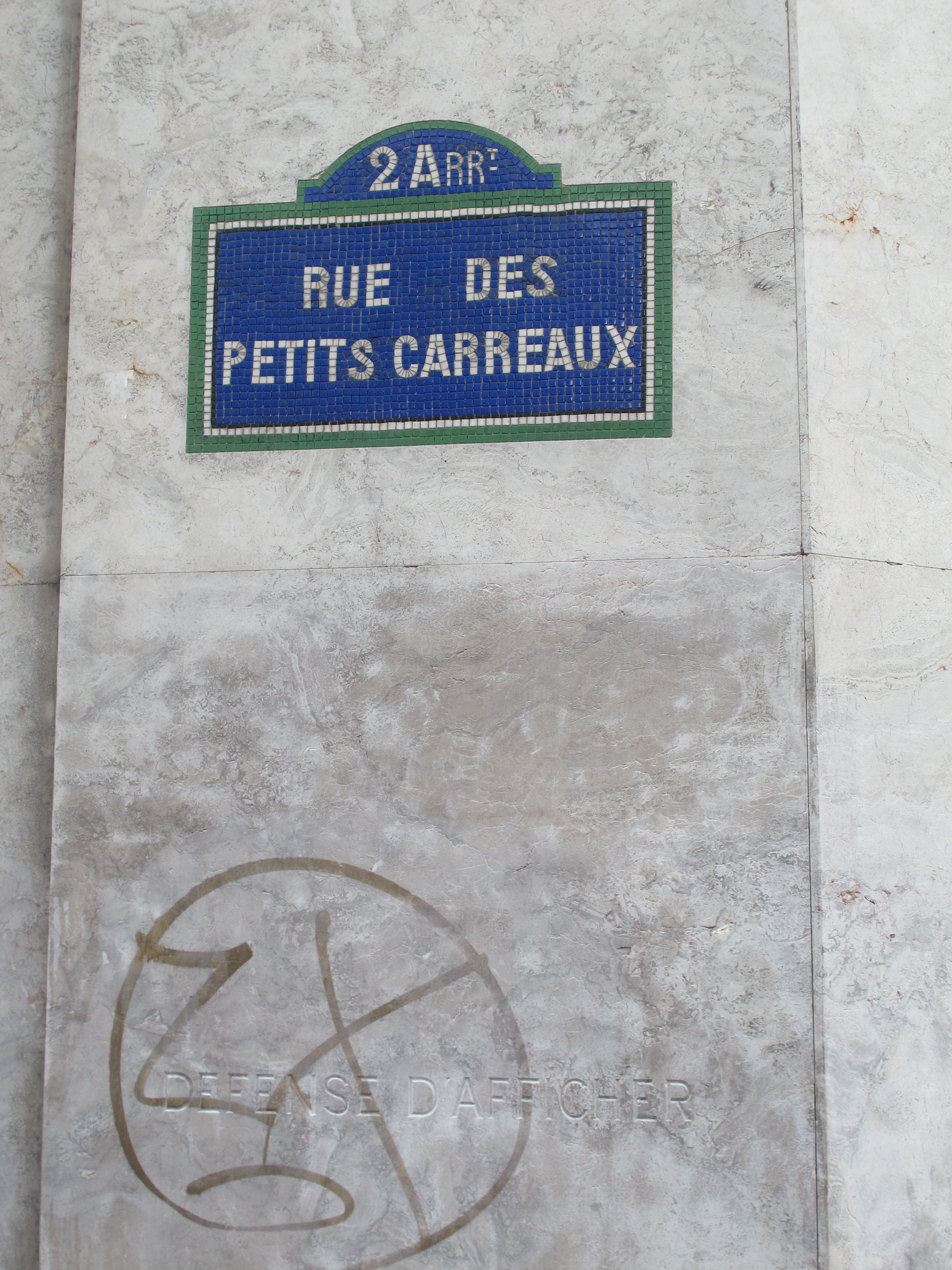 Plaque de la rue des Petits-Carreaux (Paris).